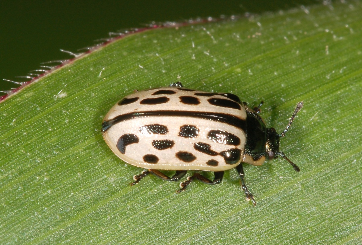 Gefleckter Weidenblattkäfer (Chrysomela vigintipunctata), Knüllwald, Hessen, Deutschland